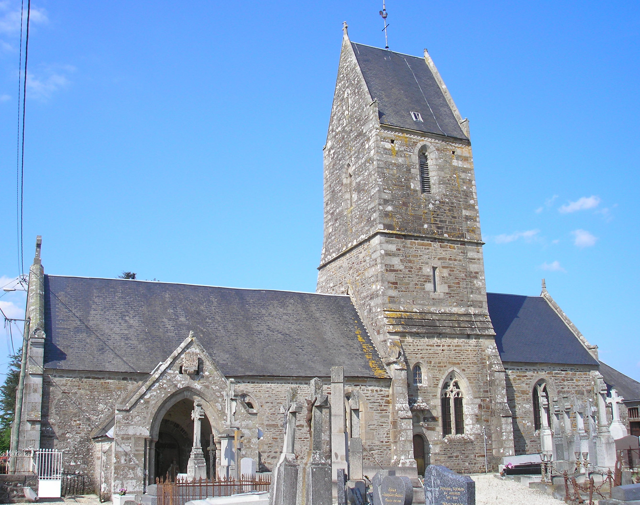 Campagnolles (Normandie, France). L'église Saint-Martin.